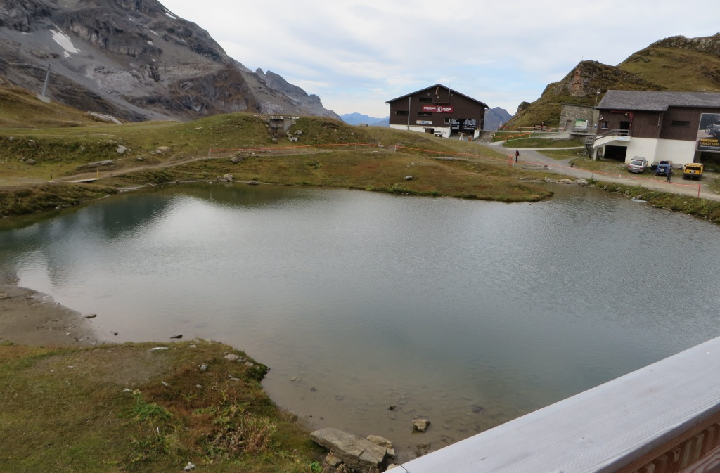 Jochseeli am Jochpass, Kantone Bern & Nidwalden, Schweiz